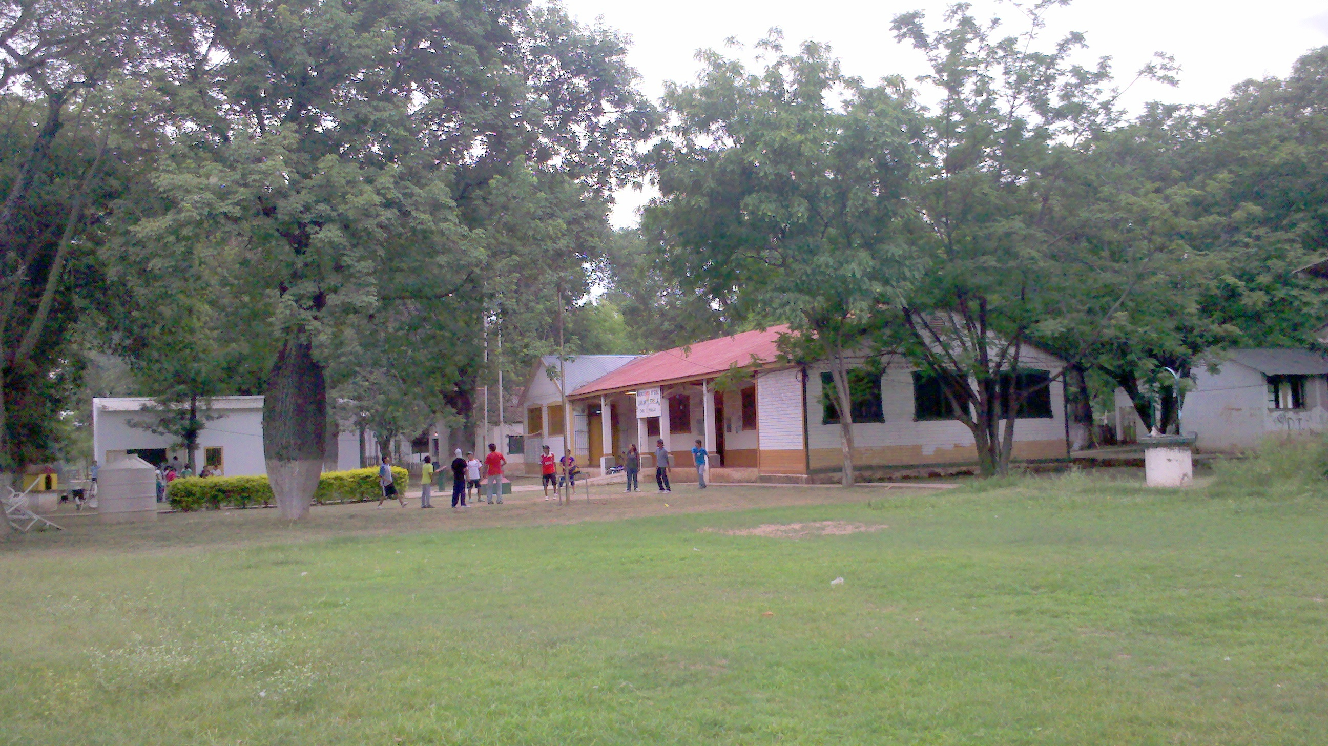 E.E.T. 3152 'Juan Angel Strella' - Coronel Cornejo - San Martín